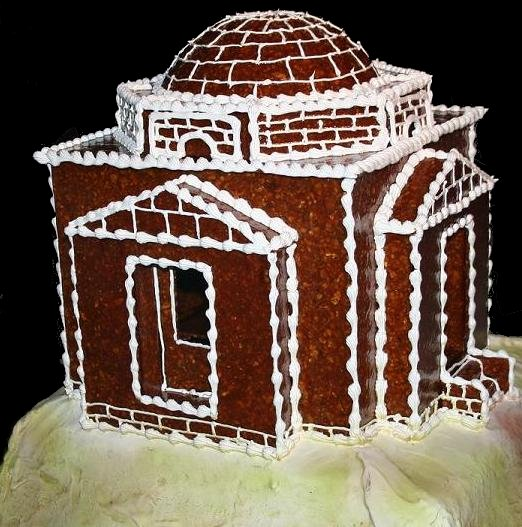 Das Mausoleum des kroatischen Künstlers Ivan Meštrović aus Krokant, welches auf Hochzeiten in Kroatien zerschlagen wird.